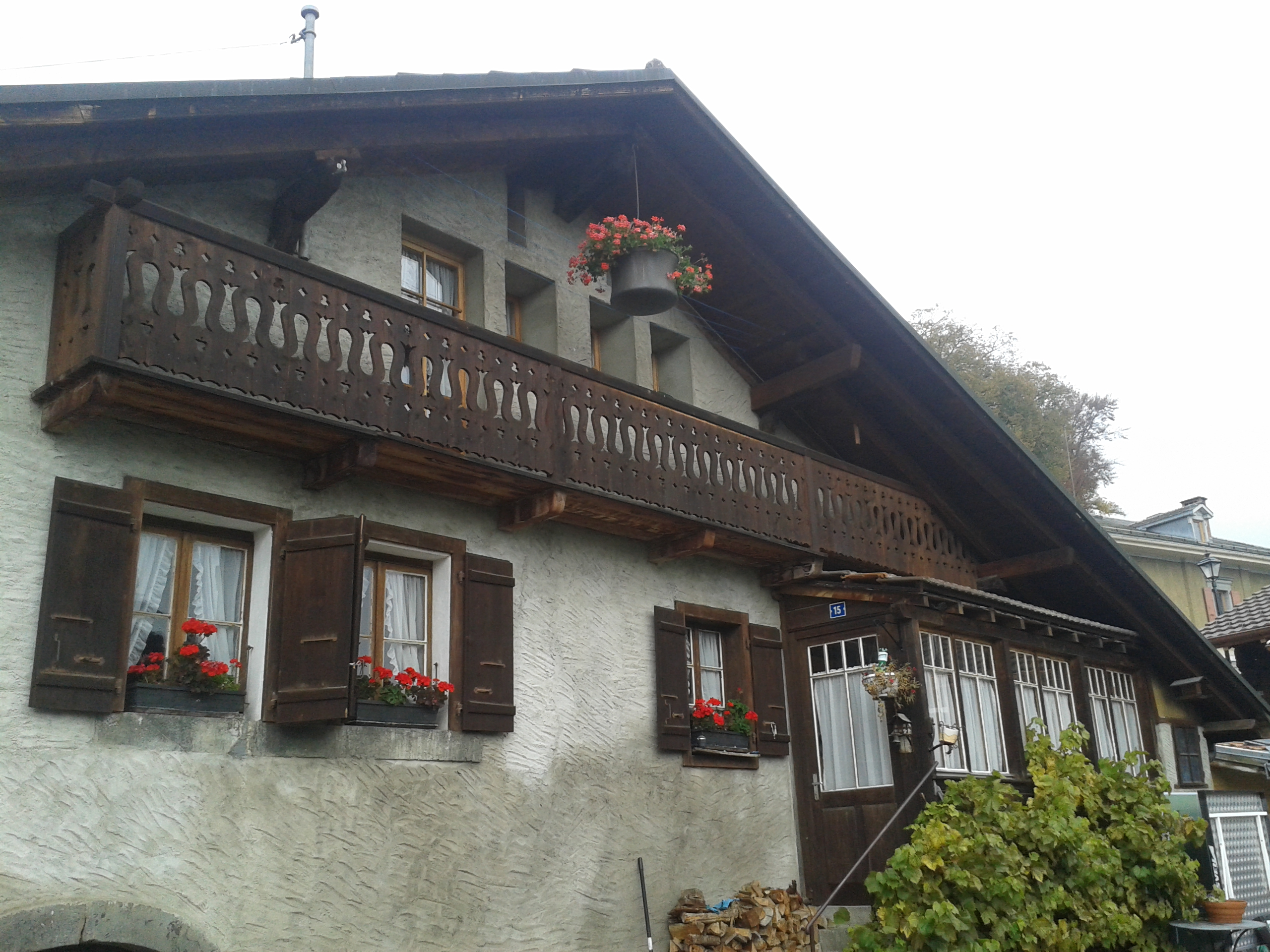 Détail d'une façade d'une maison de la rue de l'église à Huémoz, commune d'Ollon, Vaud